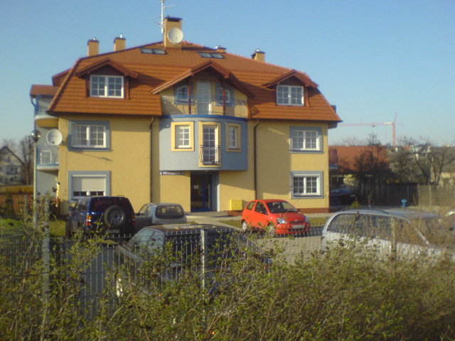 Wrocław, Wojszyce, ul. Przystankowa